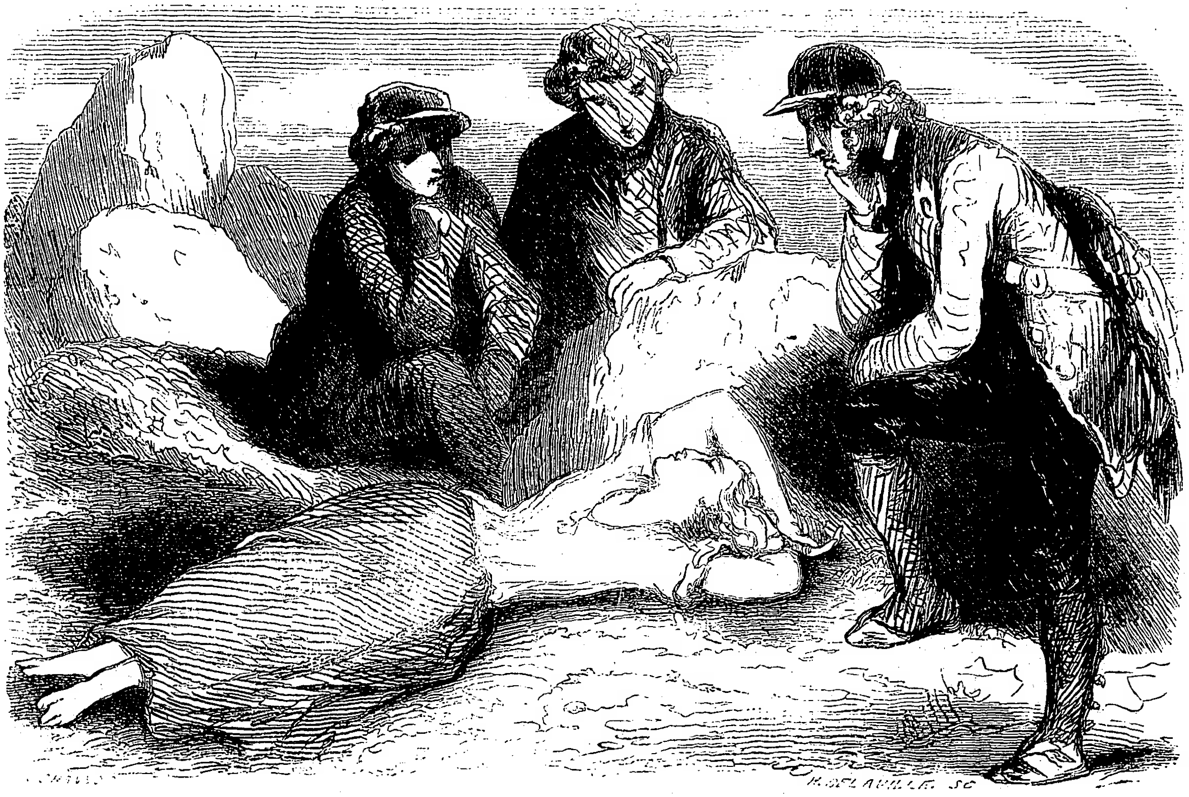 Guillaume de Boussac, sir Arthur Harley et Marsillat regardent la jeune bergère Jeanne endormie au creux des Pierres Jaumâtres, dans la Creuse, en France. Dessin en noir et blanc de Tony Johannot (gravure de A. Delaville) pour les Œuvres illustrées de George Sand, Jeanne, Paris, Jules Hetzel éditeur, volume 3, 1853.